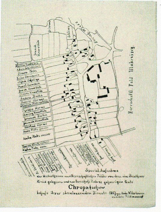 Plan przedstawiający Chropaczów w 1817 roku.